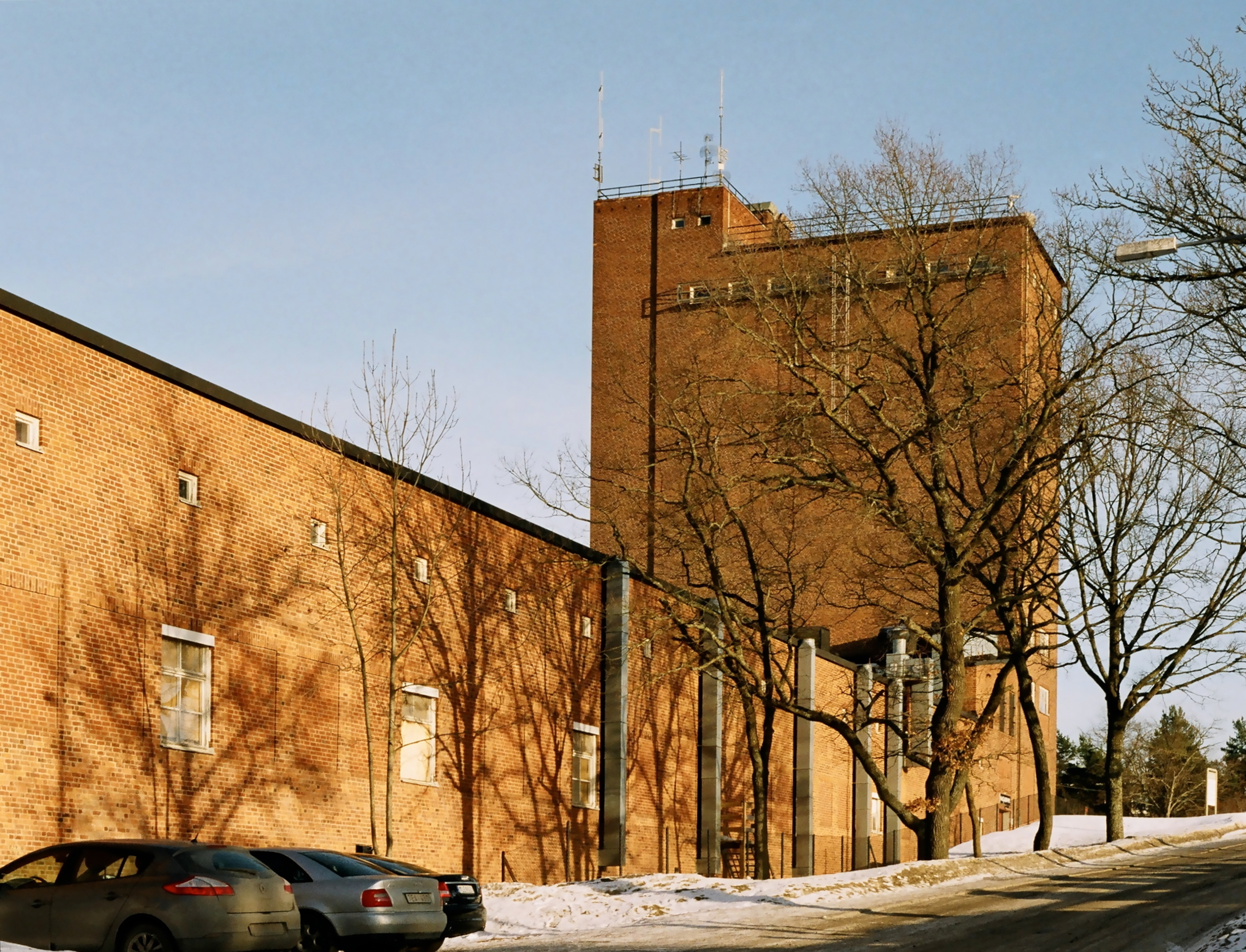 Old bakery at Kvarnholmen, in Nacka